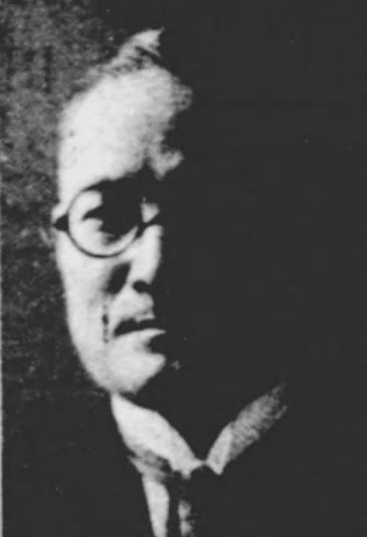 臼田久内（1864～1945）